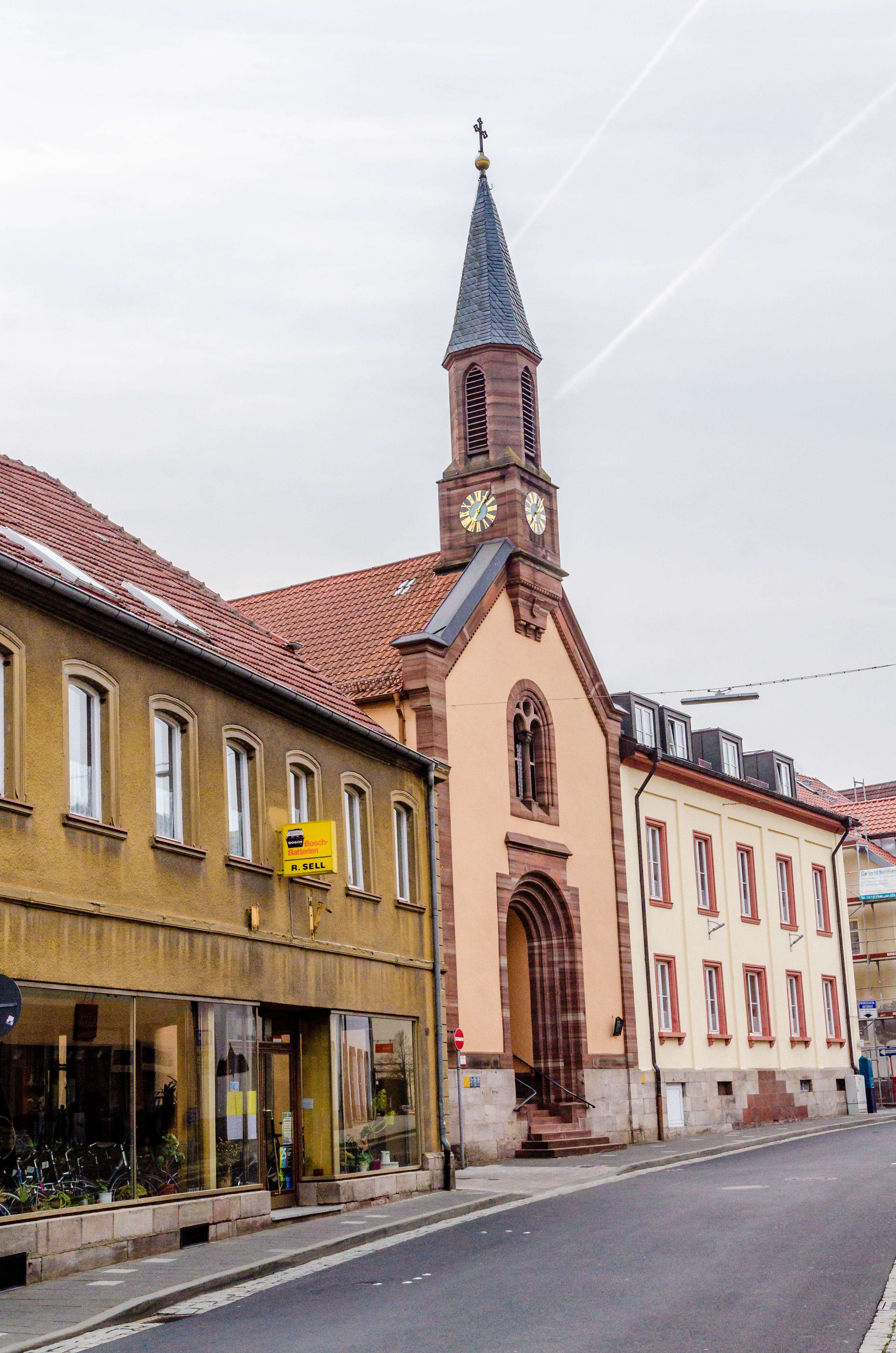 Spitalkirche St. Nikolaus in Hammelburg